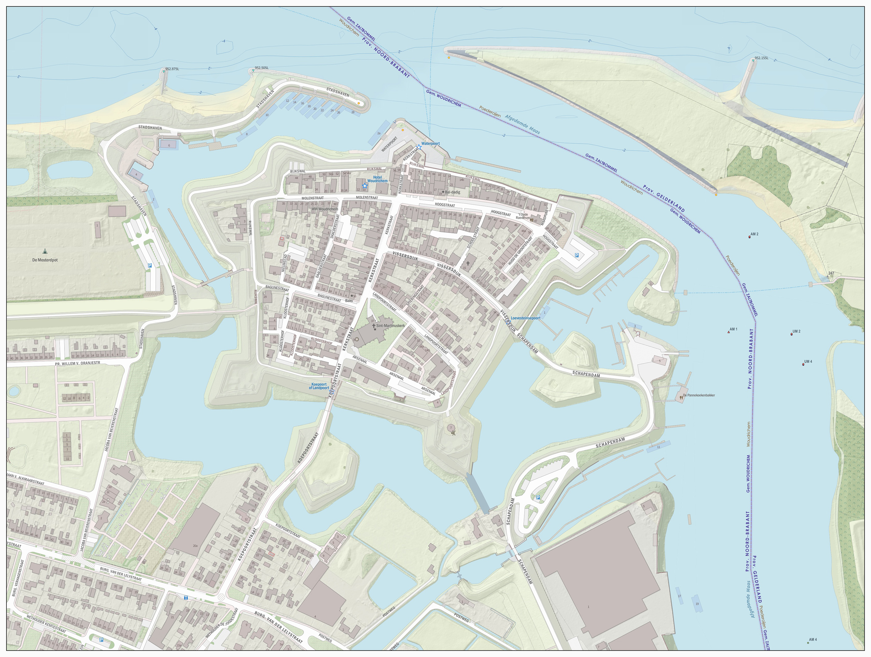 Topografische kaart van Woudrichem (centrum van woonplaats). Resolutie: 2688 pixels/km. Kaartbeeld samengesteld uit de open geodata van de Basisregistratie Grootschalige Topografie (BGT), Creative Commons-BY Kadaster, en Top10NL en Top25namen (Basisregistratie Topografie, Kadaster), Creative Commons-BY Kadaster. Gebouwvlakken uit open geodata BAG extract, Creative Commons-BY Kadaster. Wegen uit de OpenStreetMap, CC-BY OpenStreetMap bijdragers. Reliëfschaduw uit de Actuele Hoogtekaart AHN2/AHN3. Samenstelling en kleurenschema: Jan-Willem van Aalst, met QGIS2. Zie ook de Legenda.